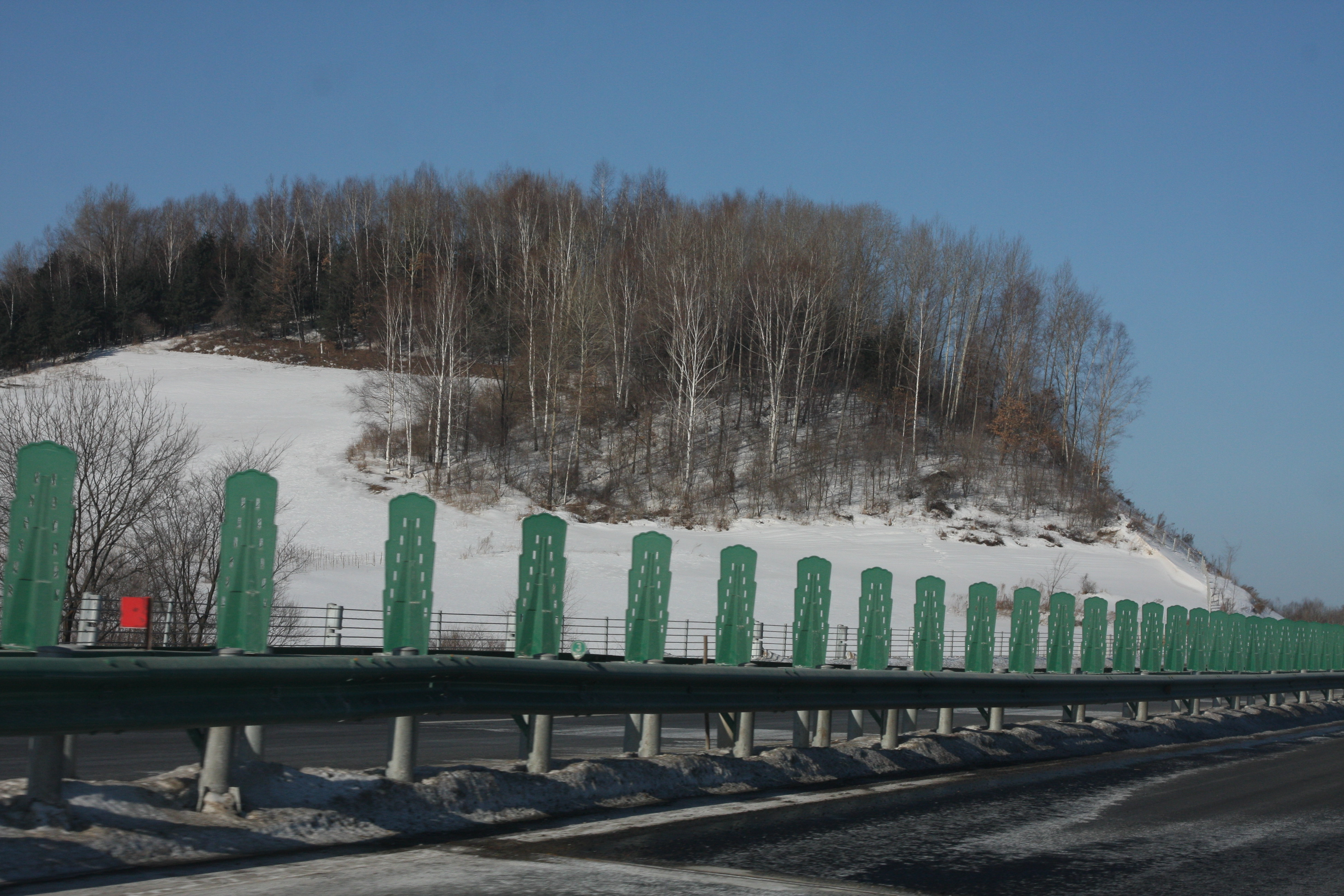 敦化至吉林高速冬景-路边雪中树林